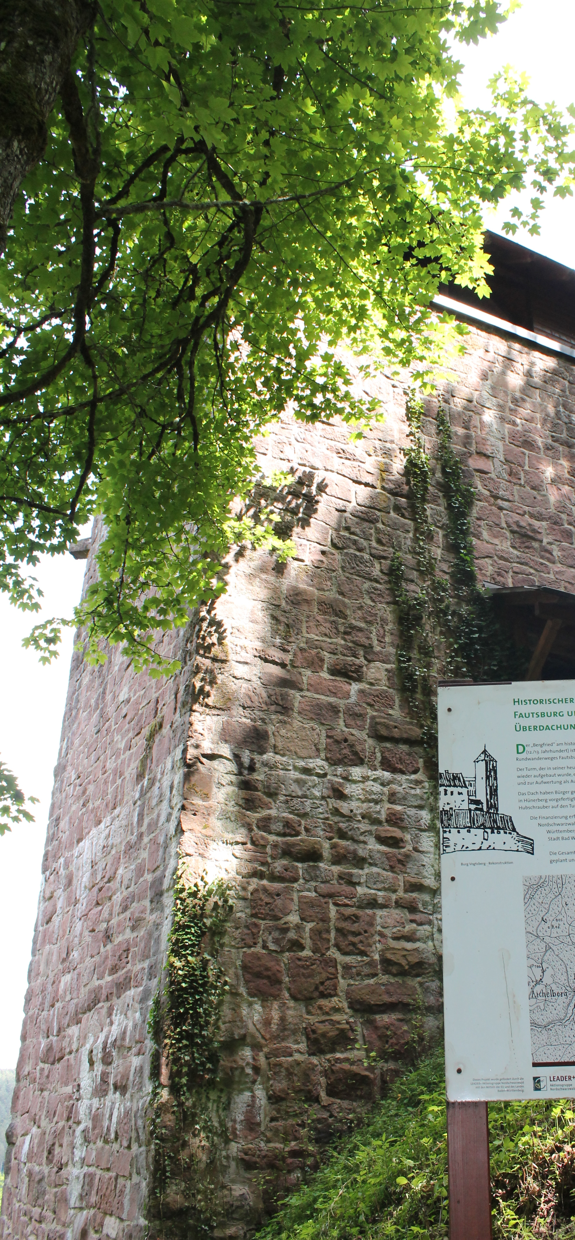 Fautsburg 12. Jahrhundert Geschichte des Amtes Neuweiler. Verbindet viele Orte in der Region über deren Geschichte. Die Burgruine liegt heute auf Bad Wildbader Gemarkung ist aber Geschichte von Neuweiler und den heutigen Bad Wildbadern Bergorten.